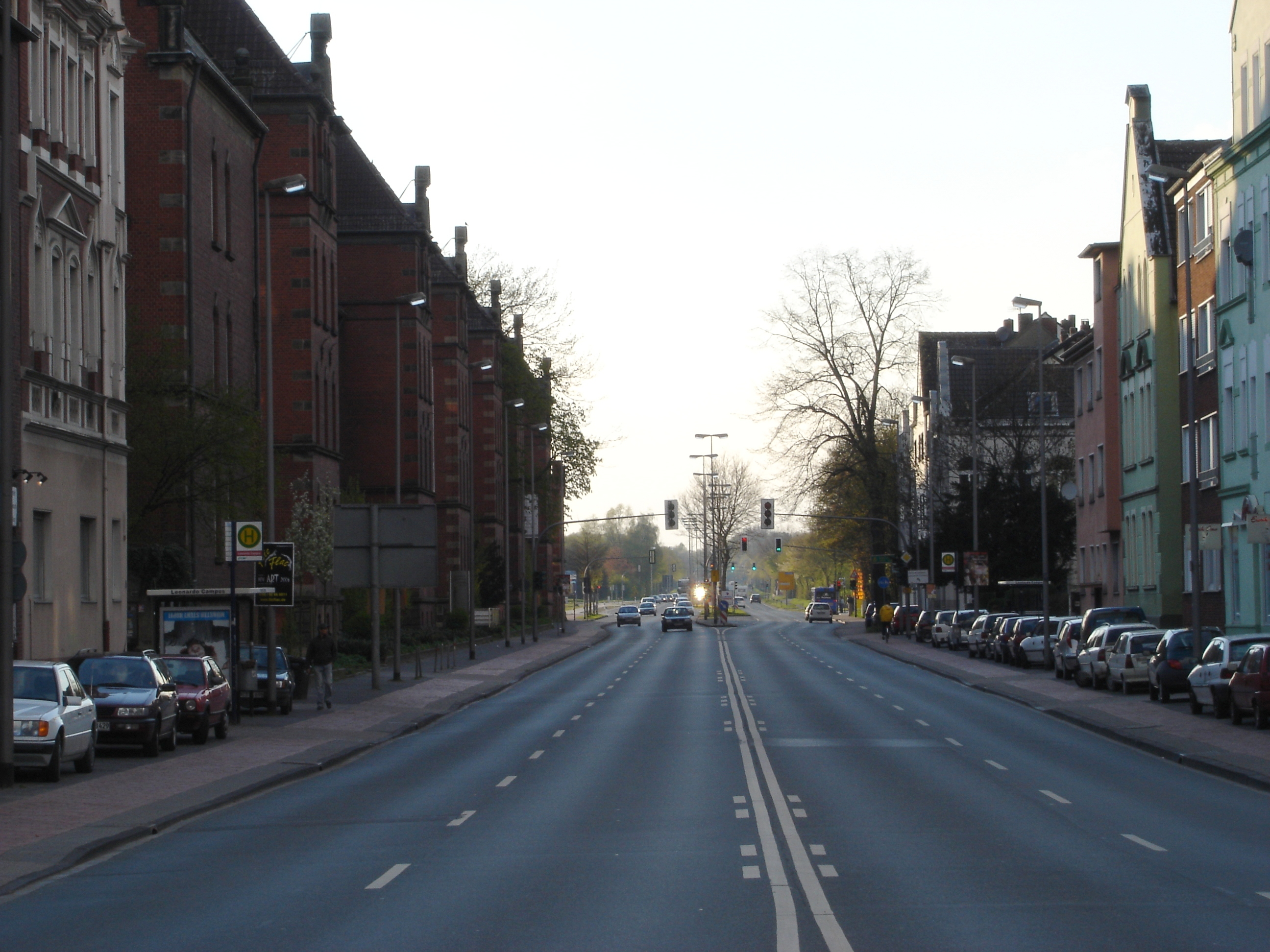 Die Steinfurter Straße in nordöstlicher Richtung in Münster, Westfalen, Deutschland